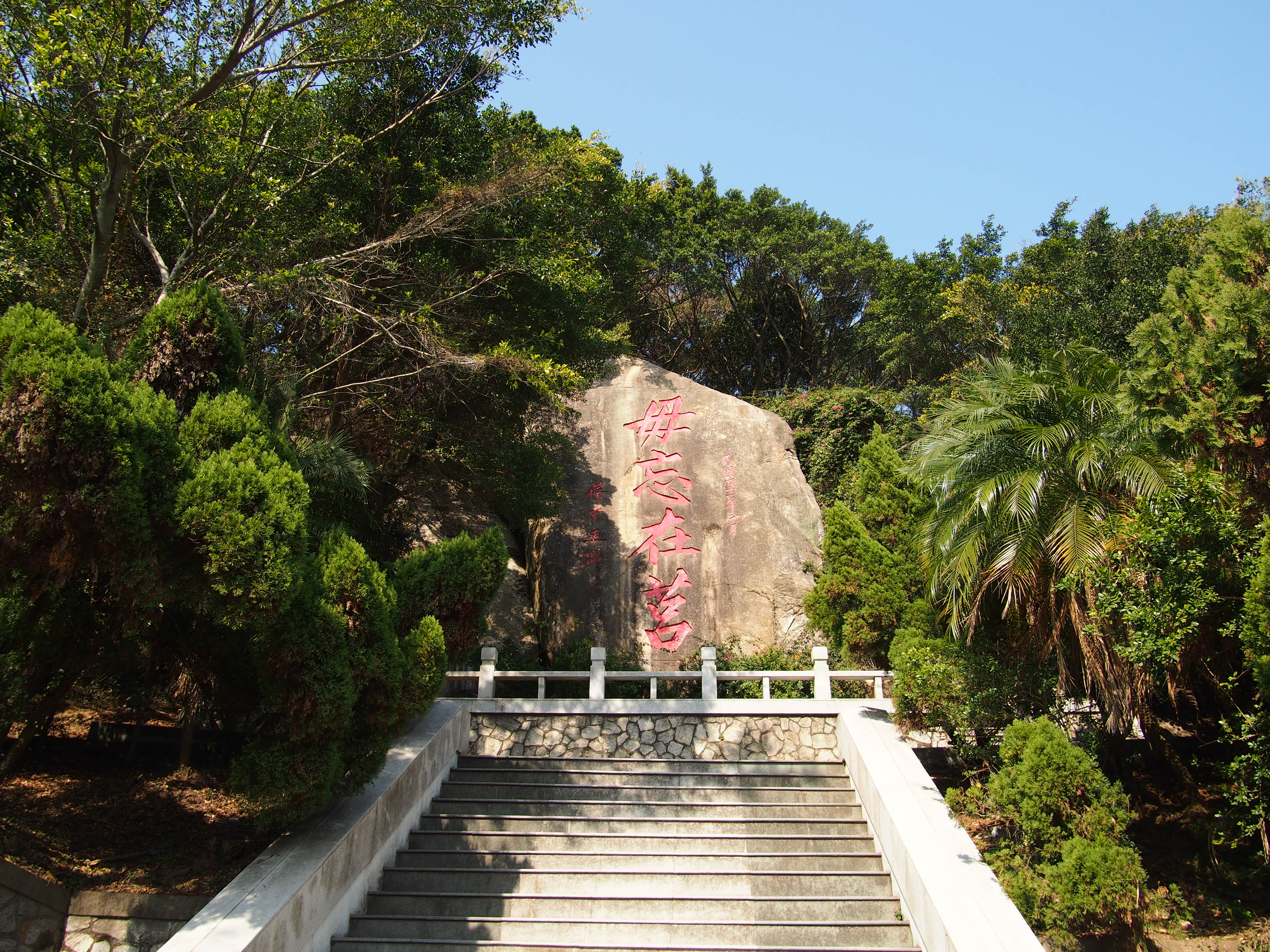 中文（台灣）: 金門縣莒光樓外，蔣中正的毋忘在莒摩崖。